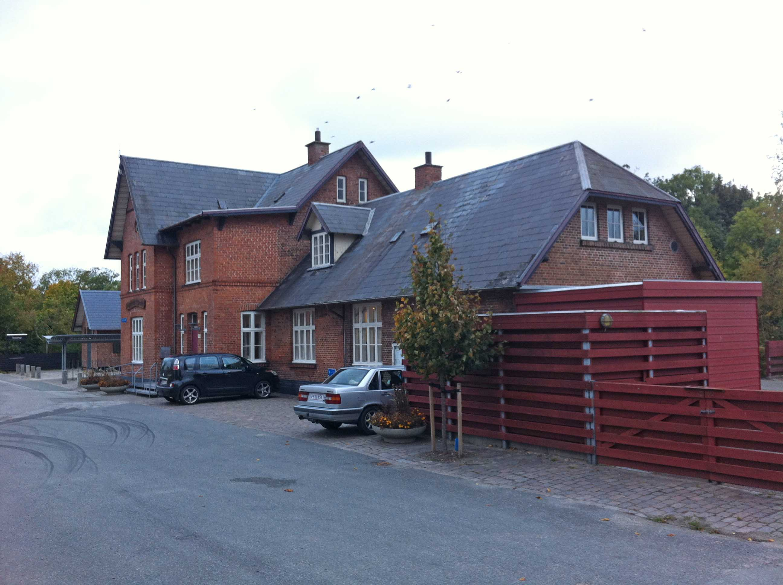 Trustrup Station, vejsiden